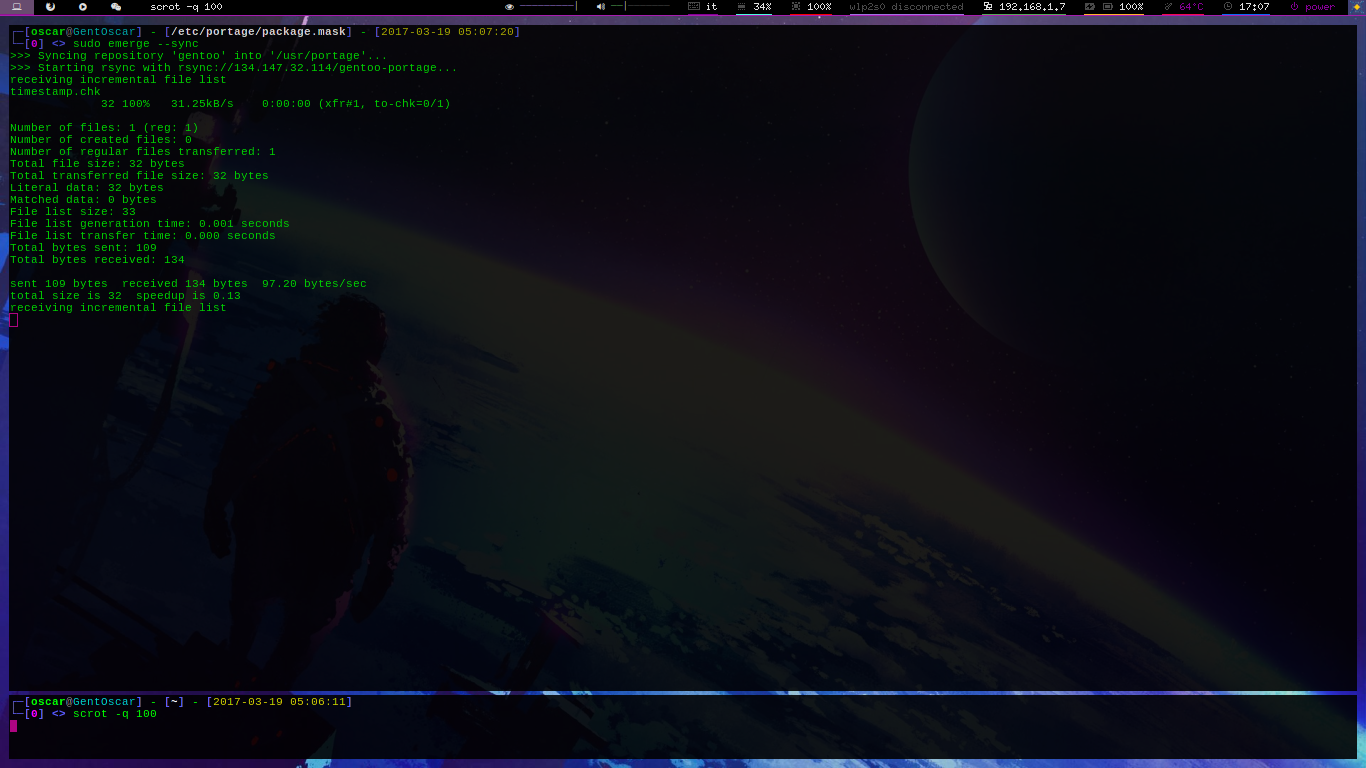 Portage che effettua l'aggiornamento dei repository con il comando "emerge --sync"